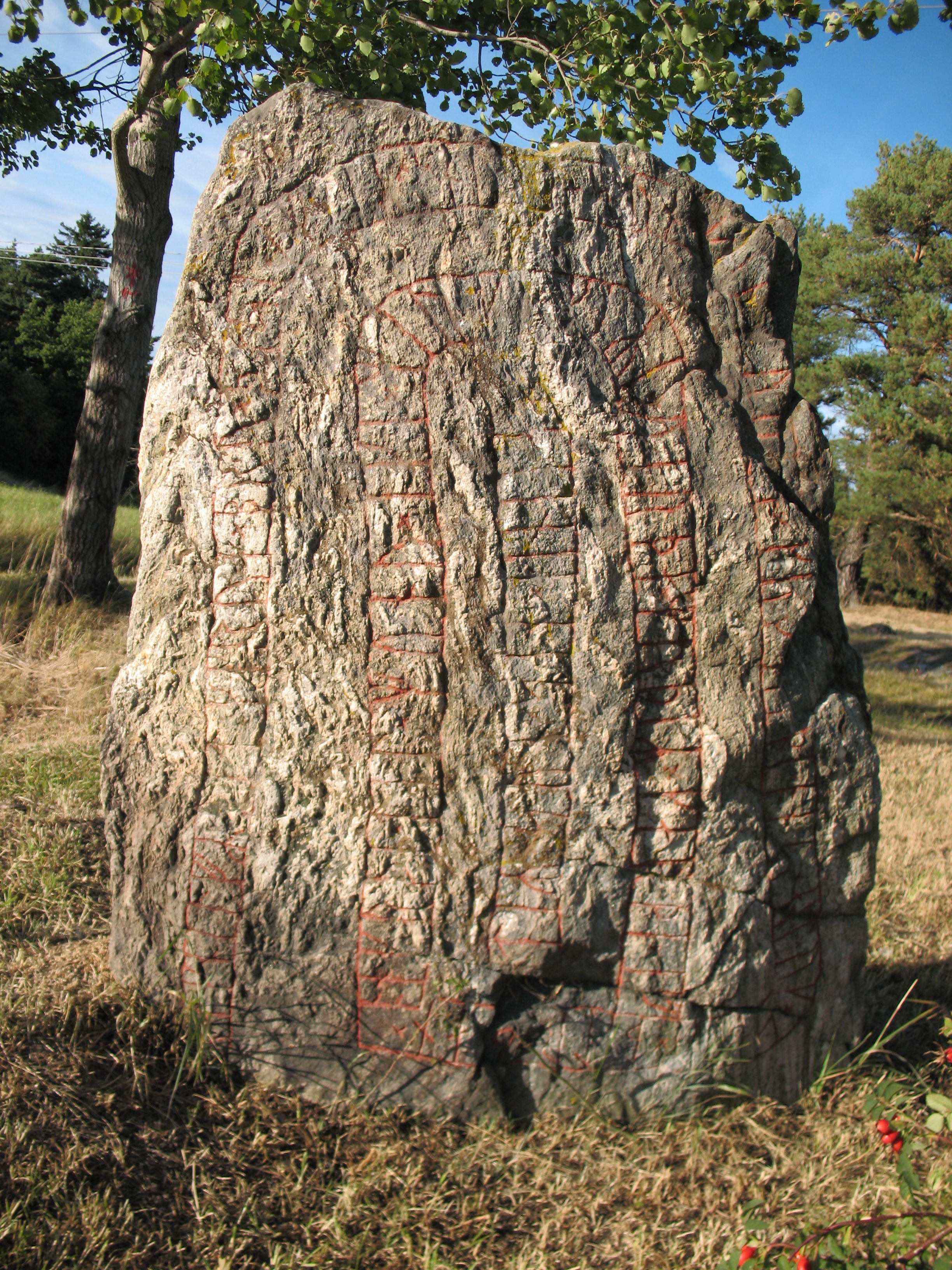 Runstenen U 69 i Eggeby, Spånga.